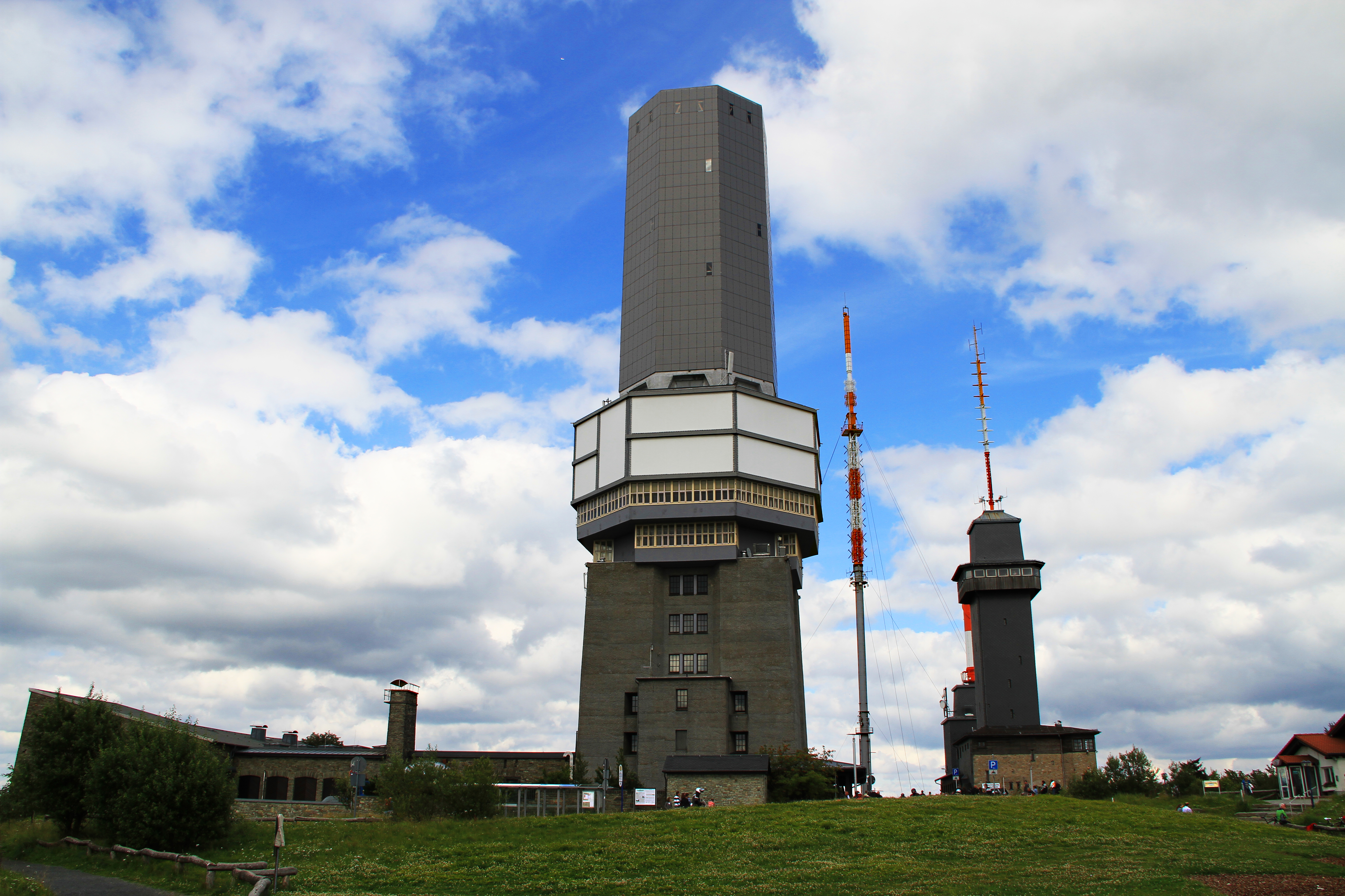 Großer Feldberg (Hessen) - Sendeanlagen